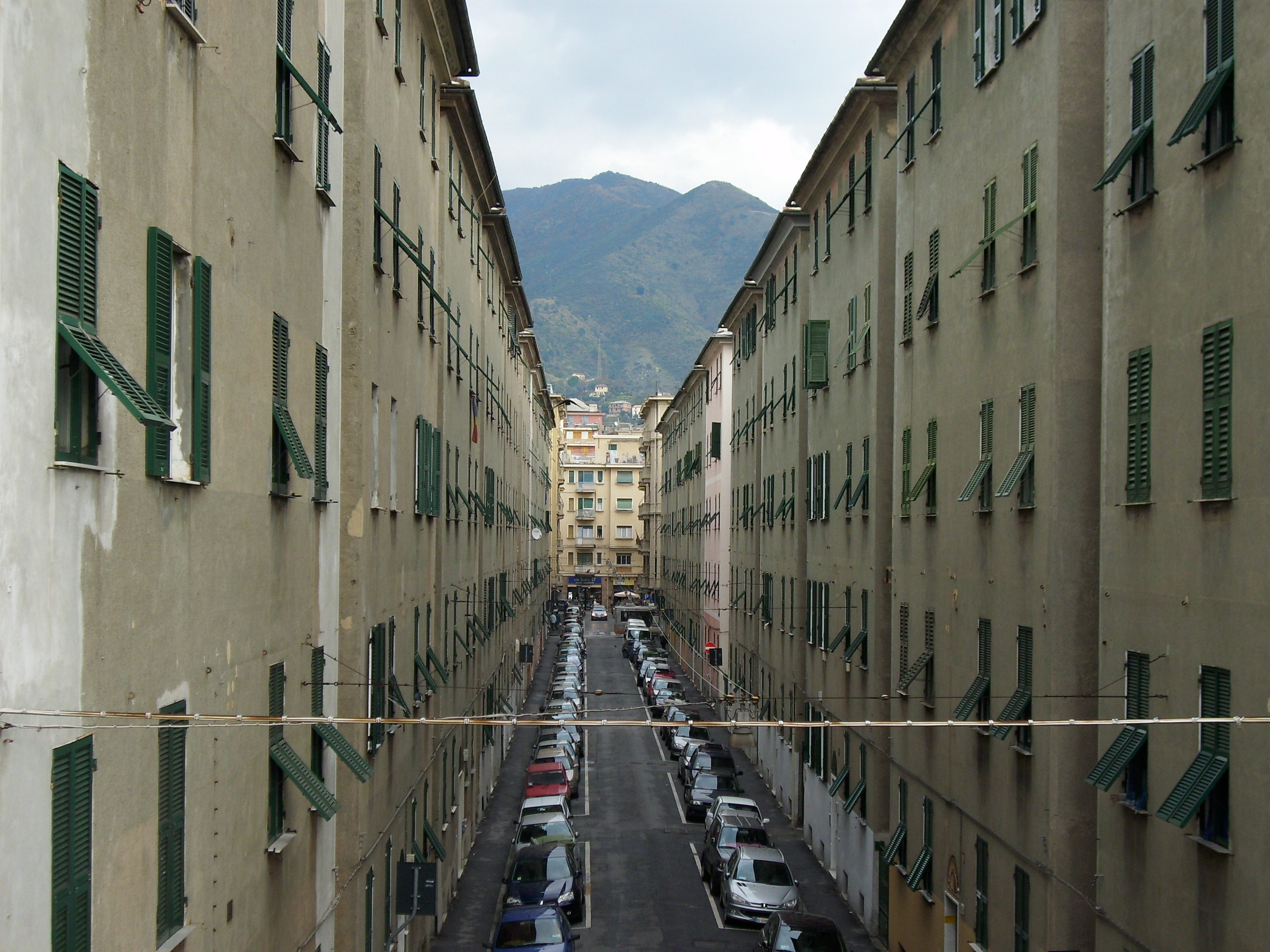 Via Caterina Rossi, Sestri P., Genova